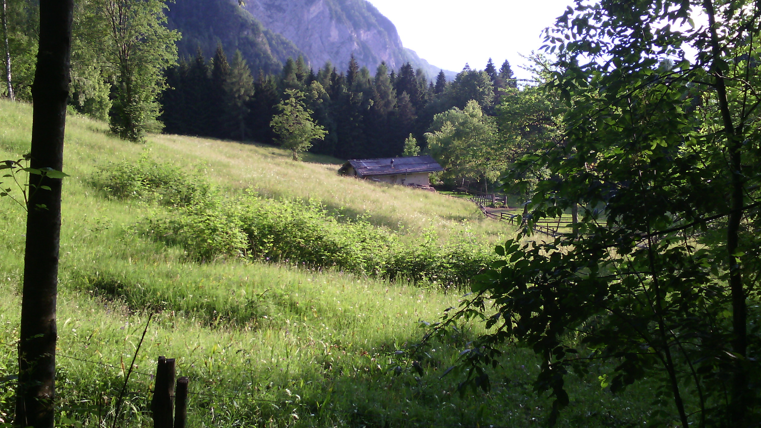 Zaccon (Q49967546)